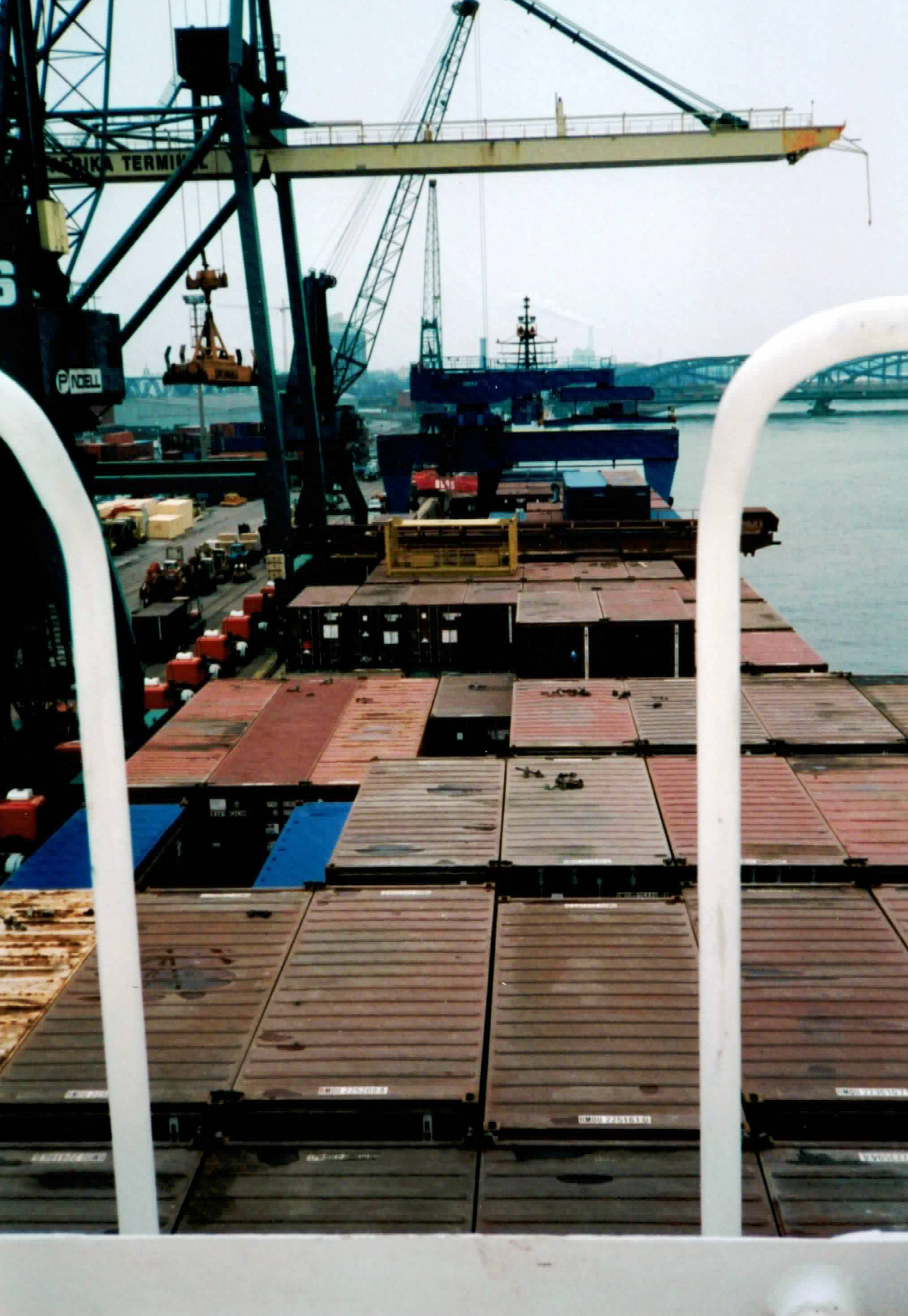 Bargen unter Deck, Container an Deck